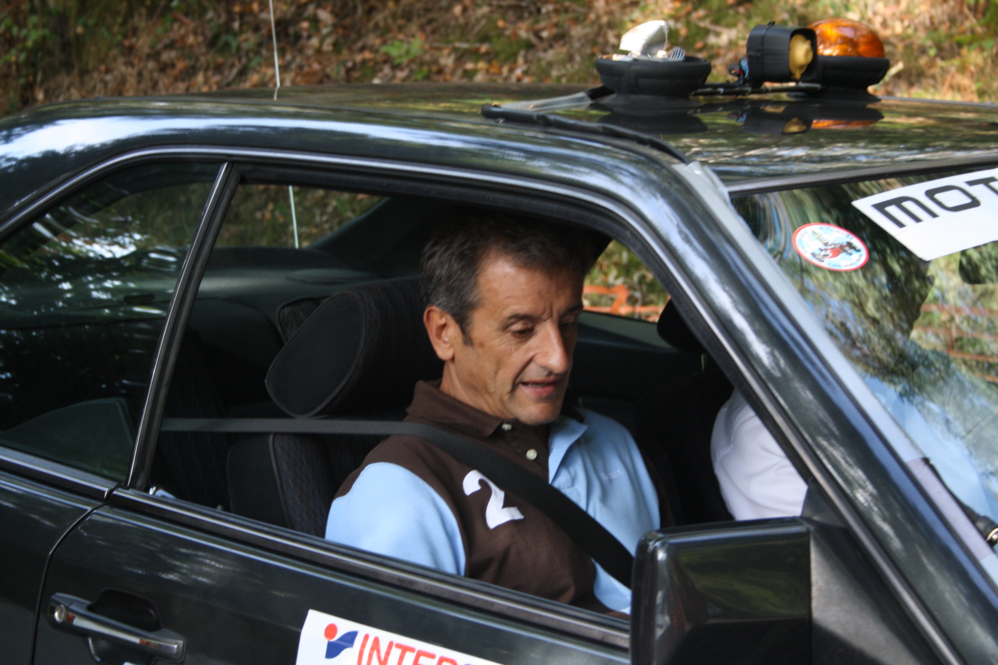 Luis Moya en 2012.